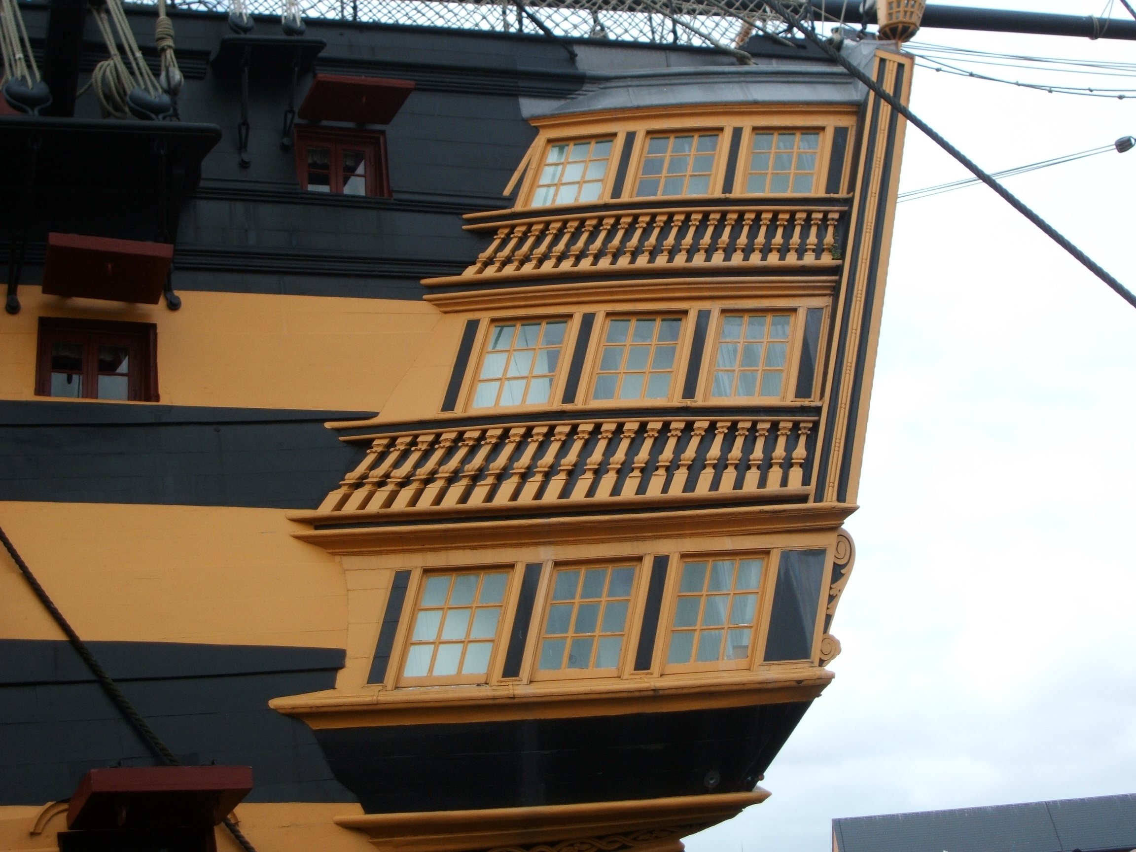 Seitentasche der HMS Victory